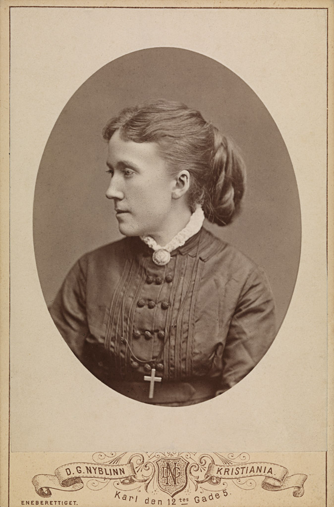 Tittel / Title: Portrett av Erika Nissen Motiv / Motif: Kabinettkort. Fotograf / Photographer: Daniel Georg Nyblin (1826-1910) Sted / Place: Oslo Eier / Owner Institution: Nasjonalbiblioteket / National Library of Norway Lenke / Link: Bildesignatur / Image Number: blds_03627